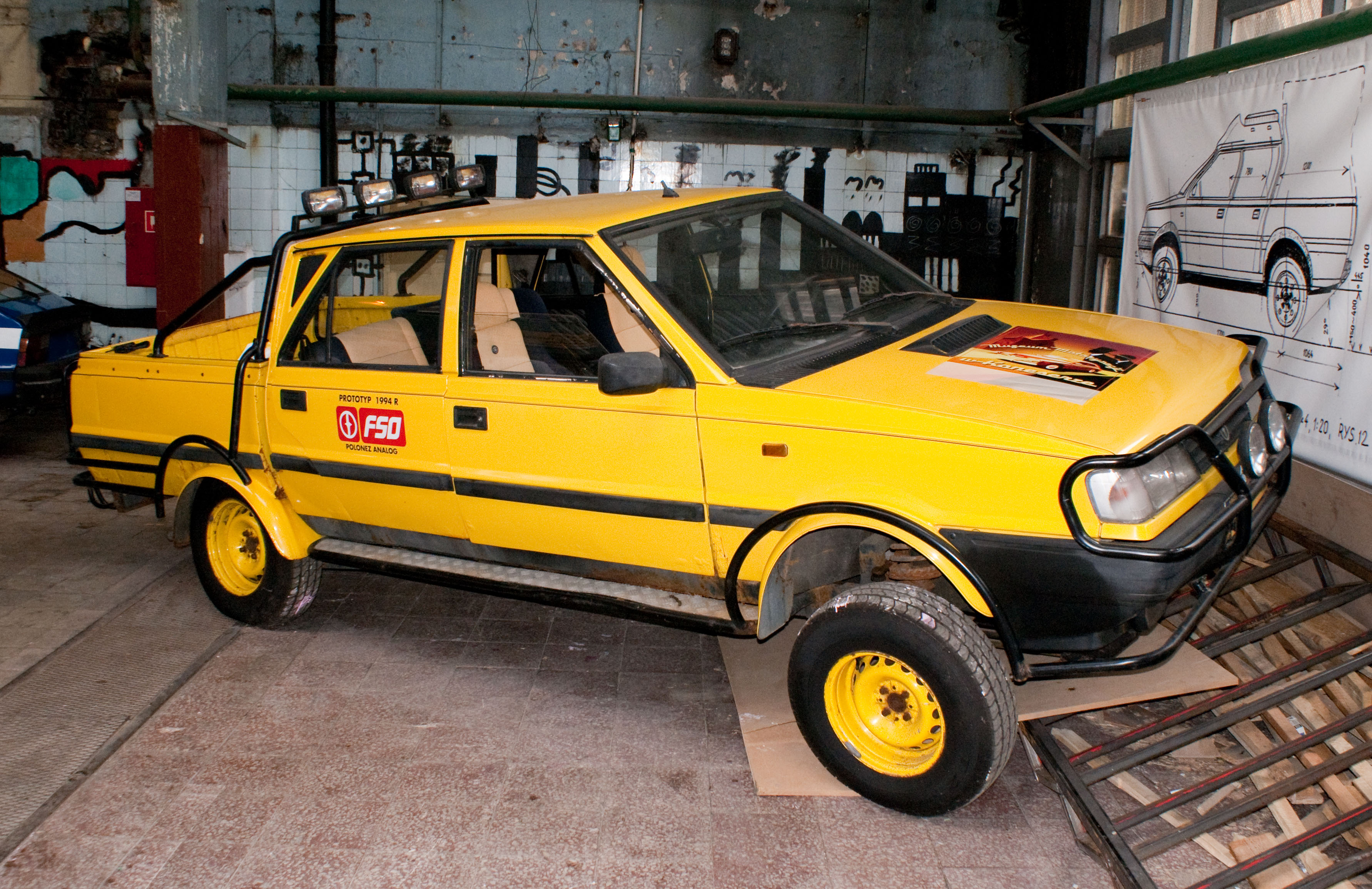 FSO Polonez Analog "4" z roku 1994. Egzemplarz wyposażony w silnik wysokoprężny 1,9 produkcji Citroena.Wystawa samochodów Prywatnego Muzeum Motoryzacji i Techniki w wytwórni Wódek Koneser.